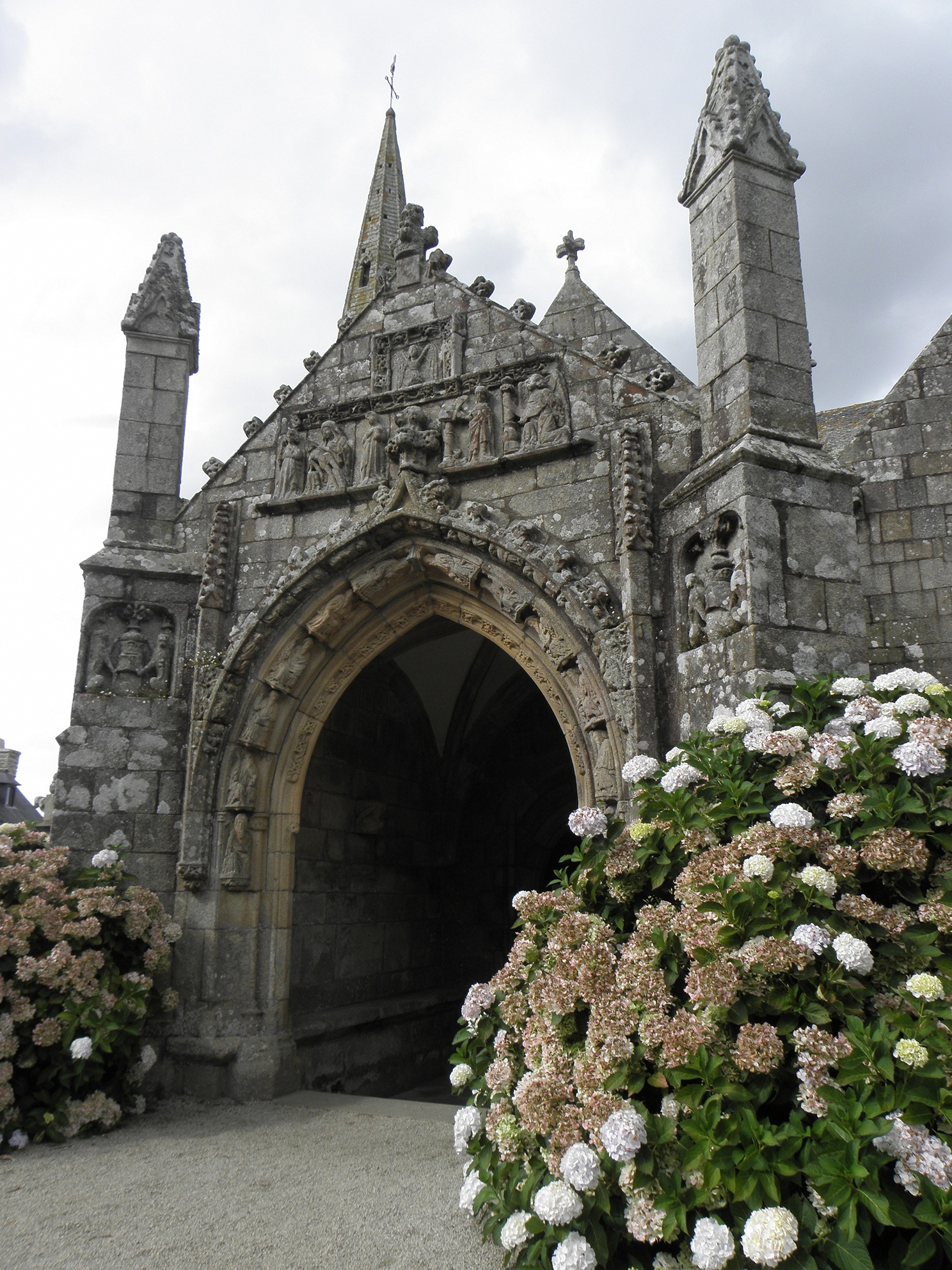 Porche sud de l'église Notre-Dame de Runan (22). .